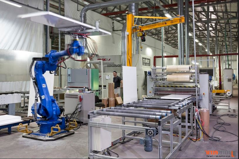 זרוע רובוטית במפעל פנדור